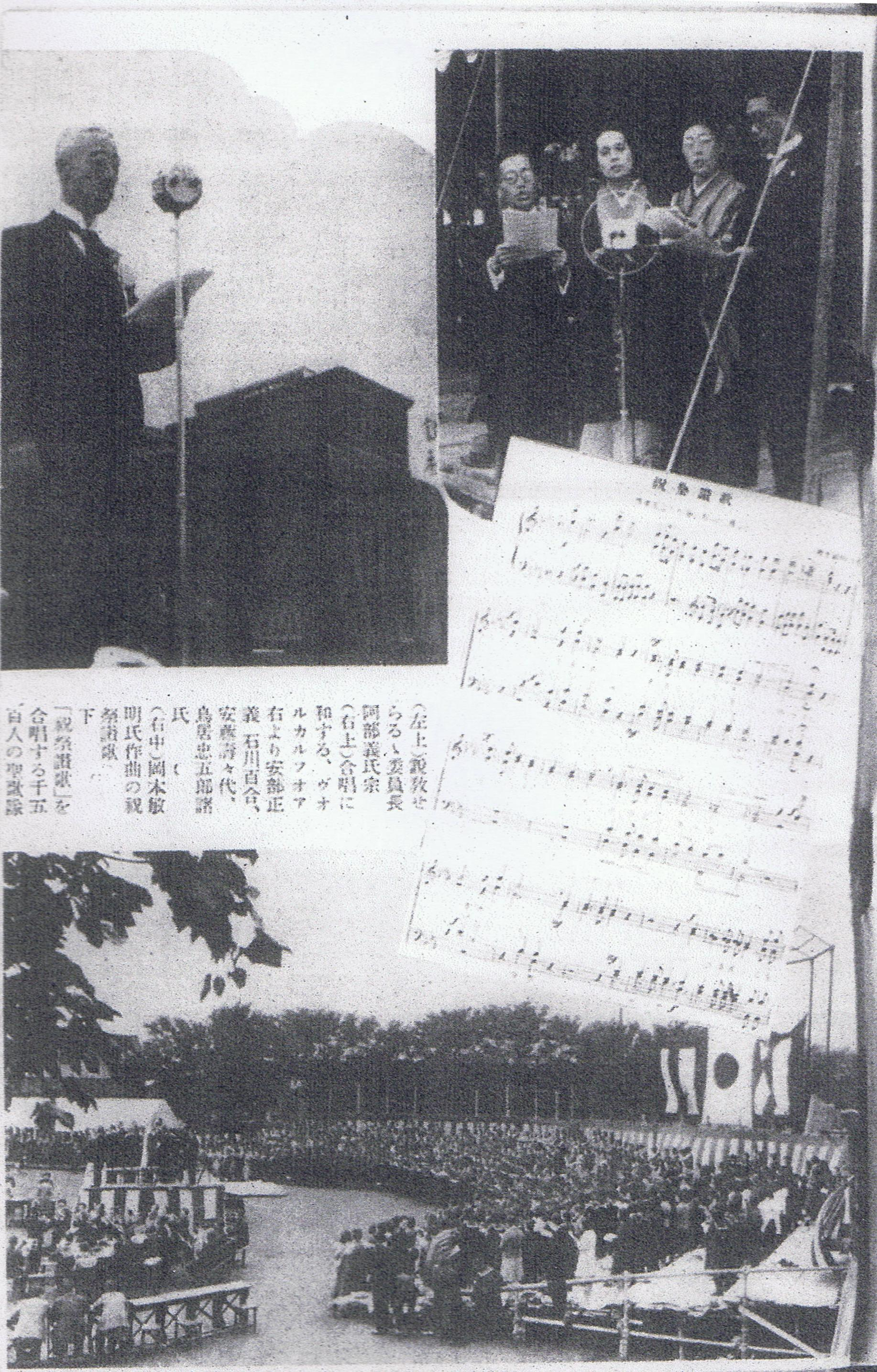 皇紀二千六百年奉祝全国基督教信徒大会奉祝讃歌